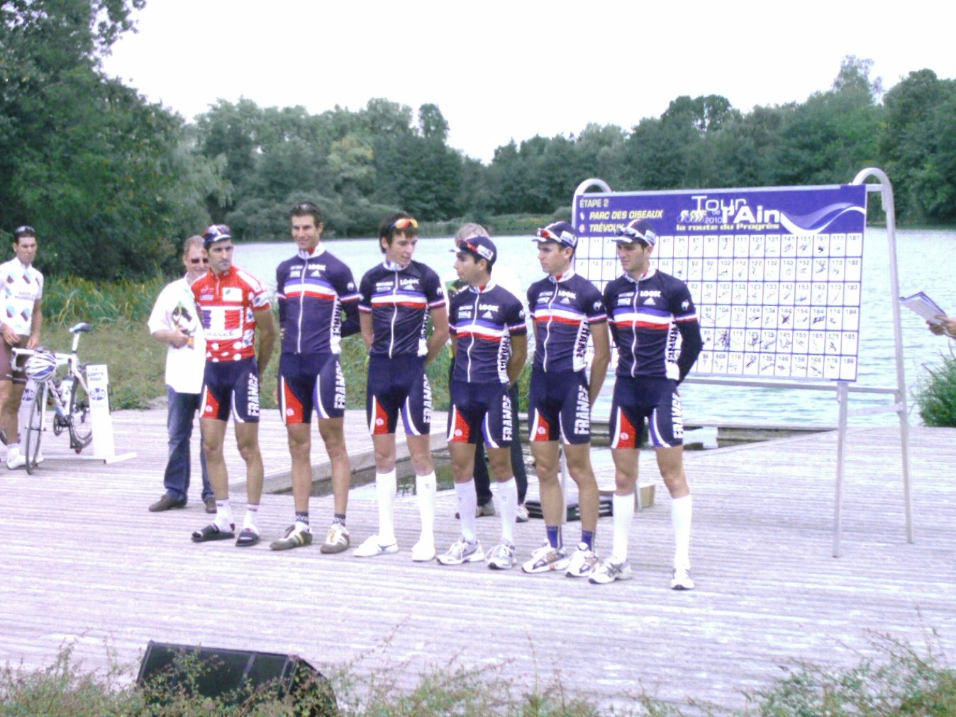 L'équipe de France espoir lors de la présentation des équipes au départ de la 2e étape du Tour de l'Ain 2010 au Parc des oiseaux de Villars-les-Dombes. L'équipe est composée de Yoann Barbas, Romain Bardet, Thomas Bonnin, Arnaud Courteille, Jean-Lou Paiani et Geoffrey Soupe